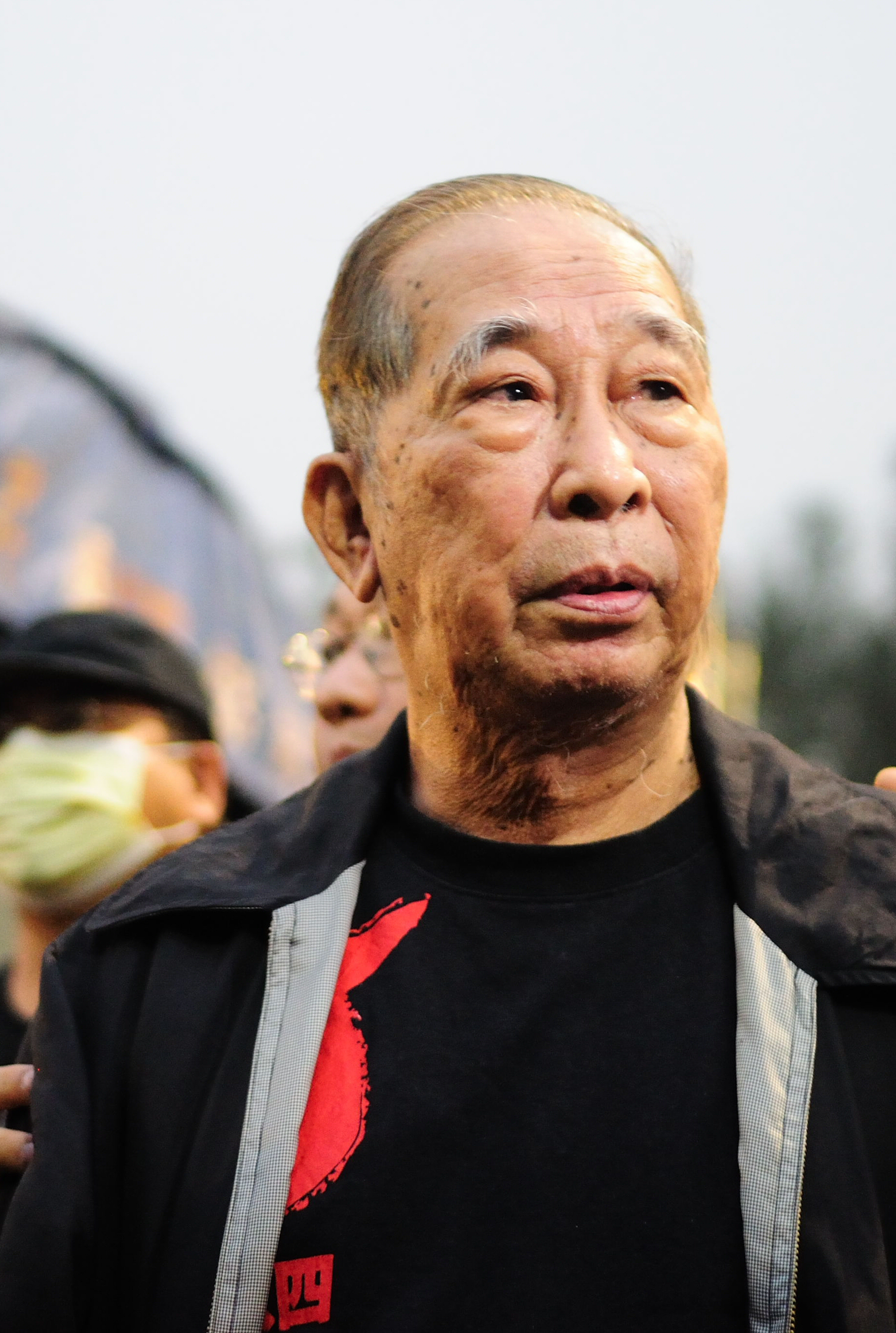 司徒華在維園平反六四21週年燭光晚會，2010年 Bân-lâm-gú: Su-tôo Huâ tsāi Uî-hn̂g pîng-huán Lio̍k-sù 21-tsiu-nî tsik-kng buán-huē, 2010-nî. 司徒華在維園平反六四21週年燭光晚會，2010年